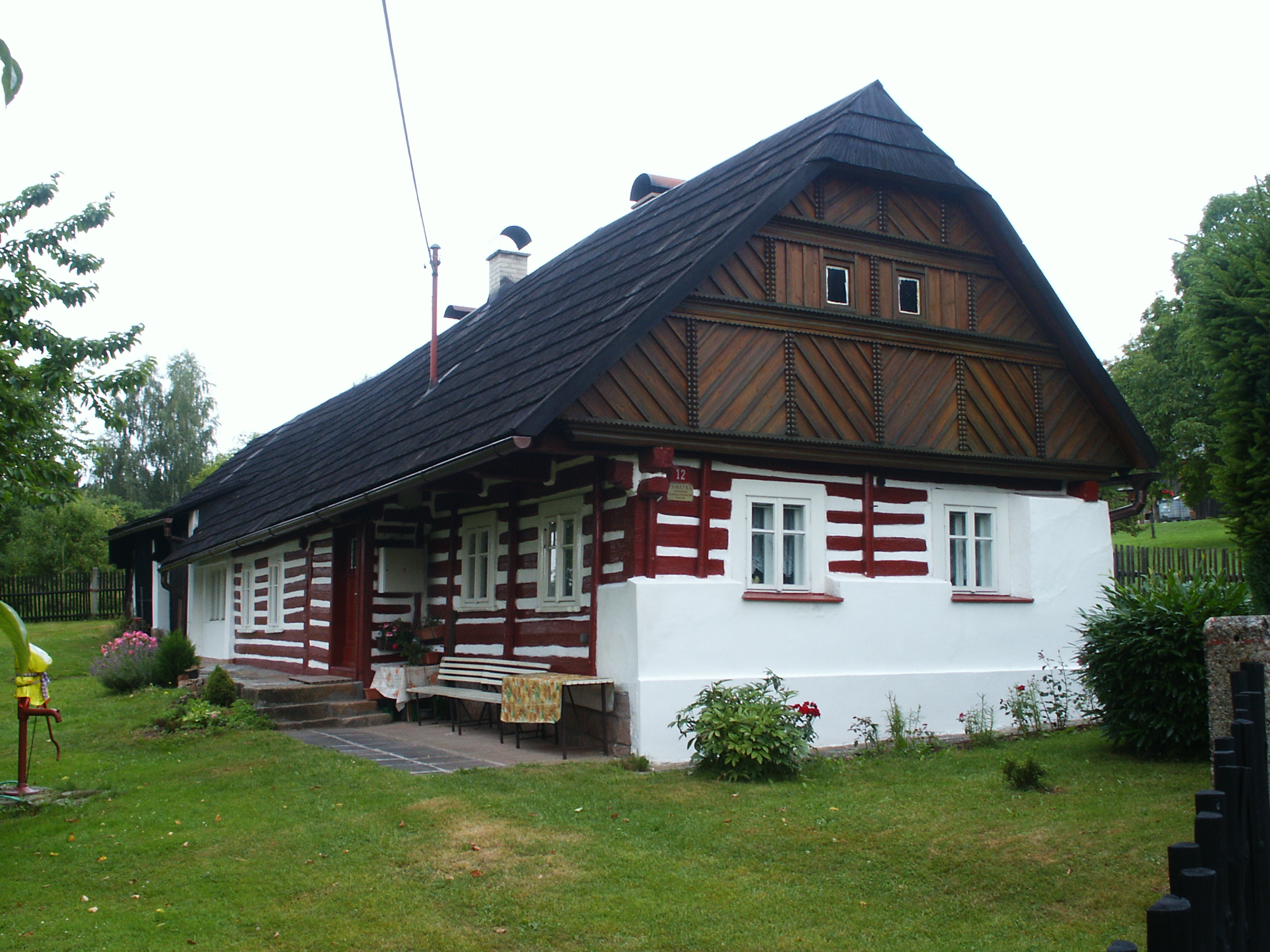 Venkovský dům, pod zastávkou ČSAD 12, Přibyslav (Nová Paka).